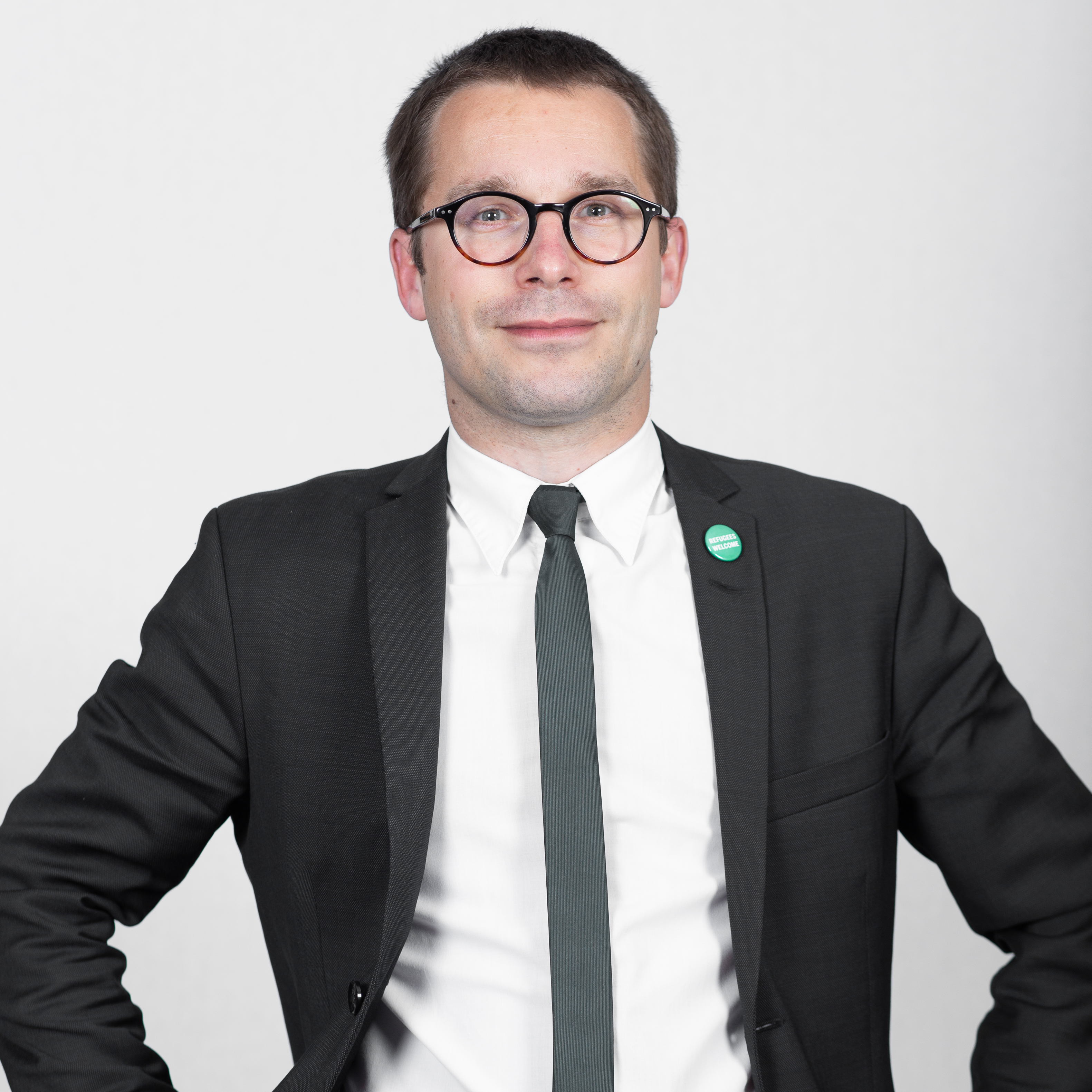 Sebastian Striegel, MdL Sachsen-Anhalt, B90/Grüne